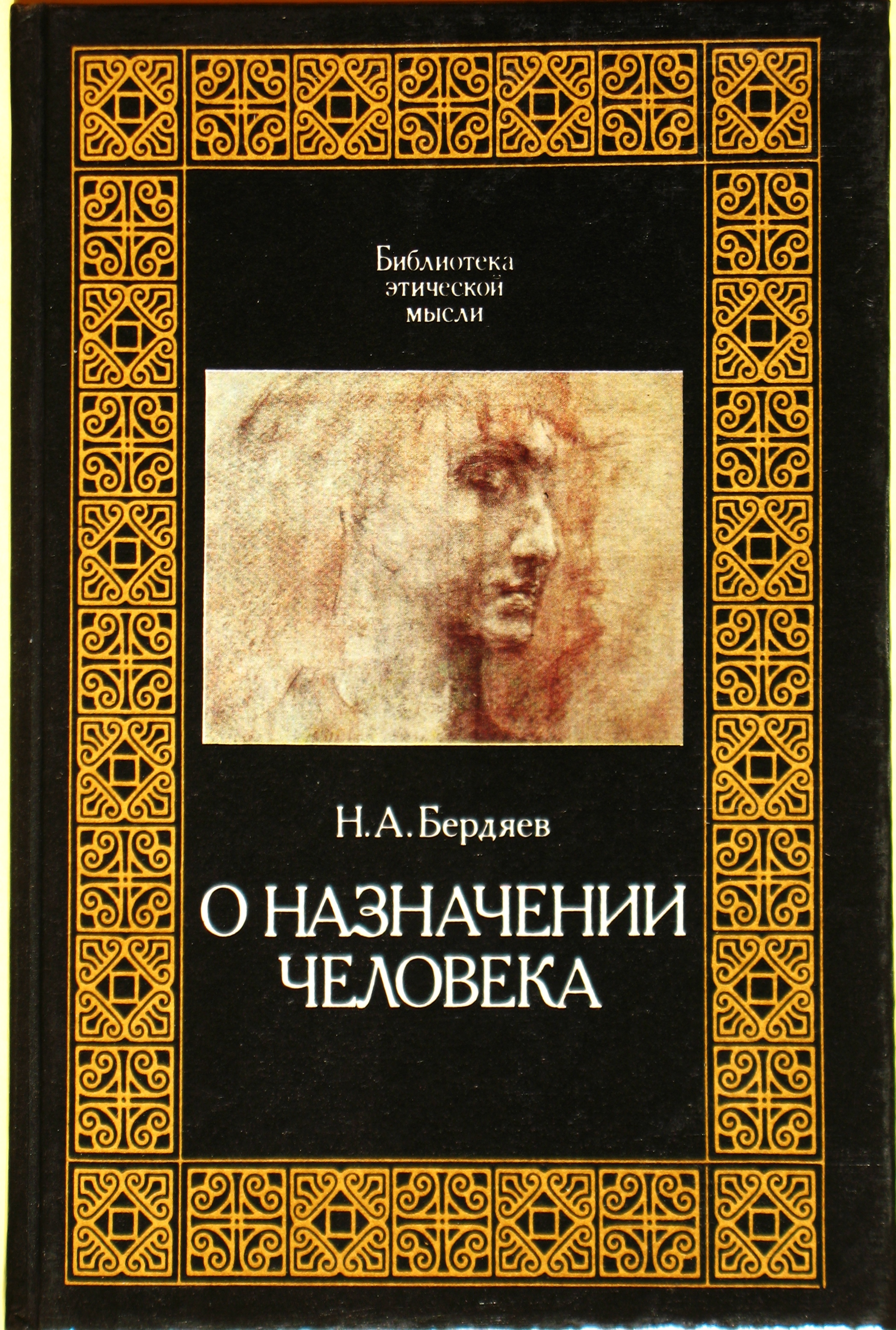 Nikolai Berdjaev book. Серия "Библиотека этической мысли". Бердяев Николай, О назначении человека. Москва, изд. "Республика", 1993, тираж 30 000, 384 стр. Обложка - рисунок М. Врубеля "Демон".